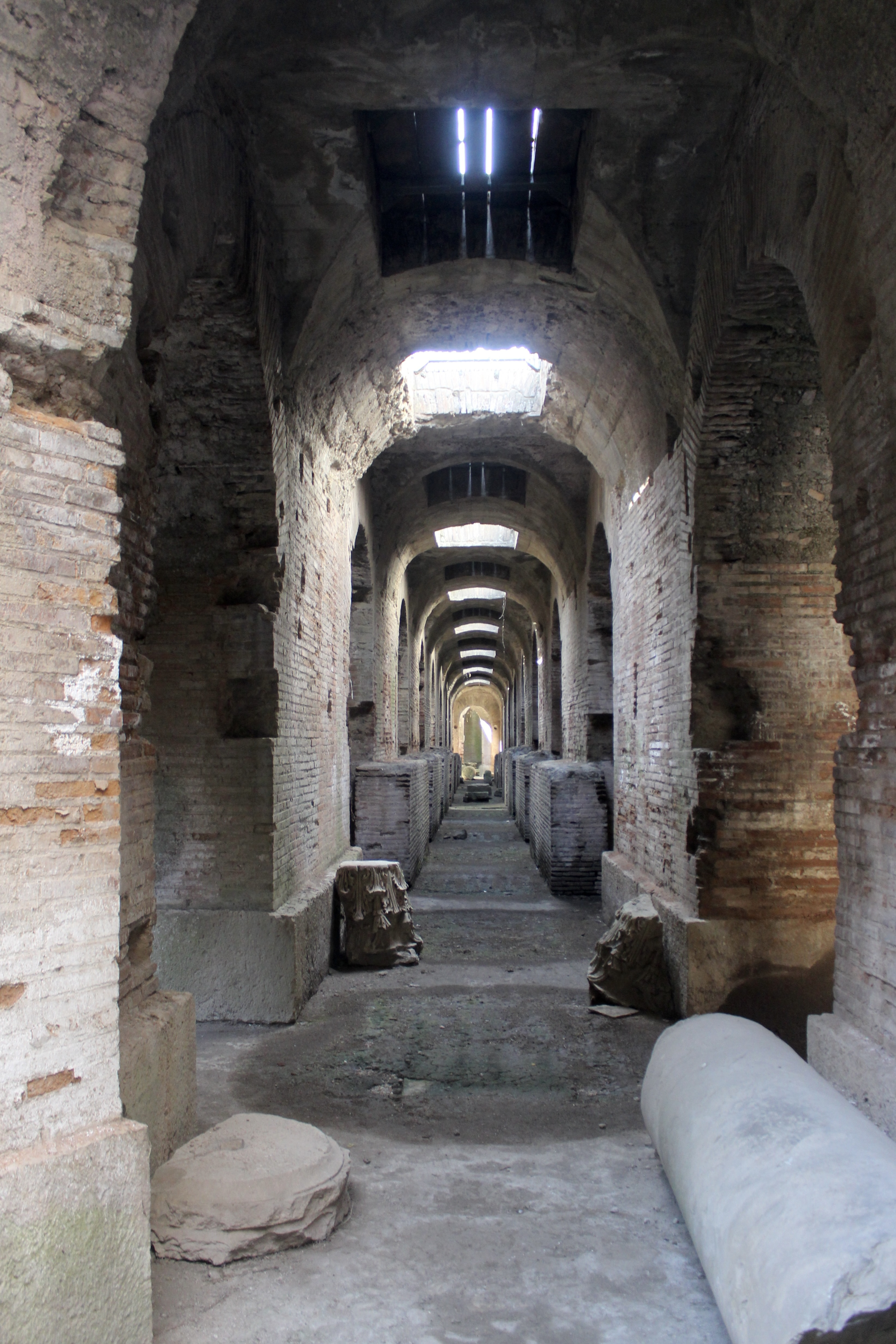 Santa Maria Capua Vetere. Anfiteatro.